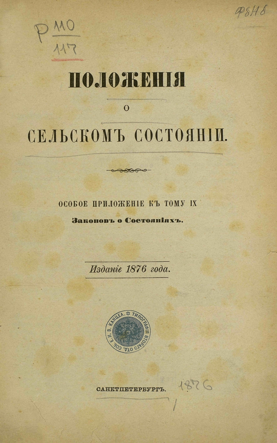 Положения о сельском состоянии